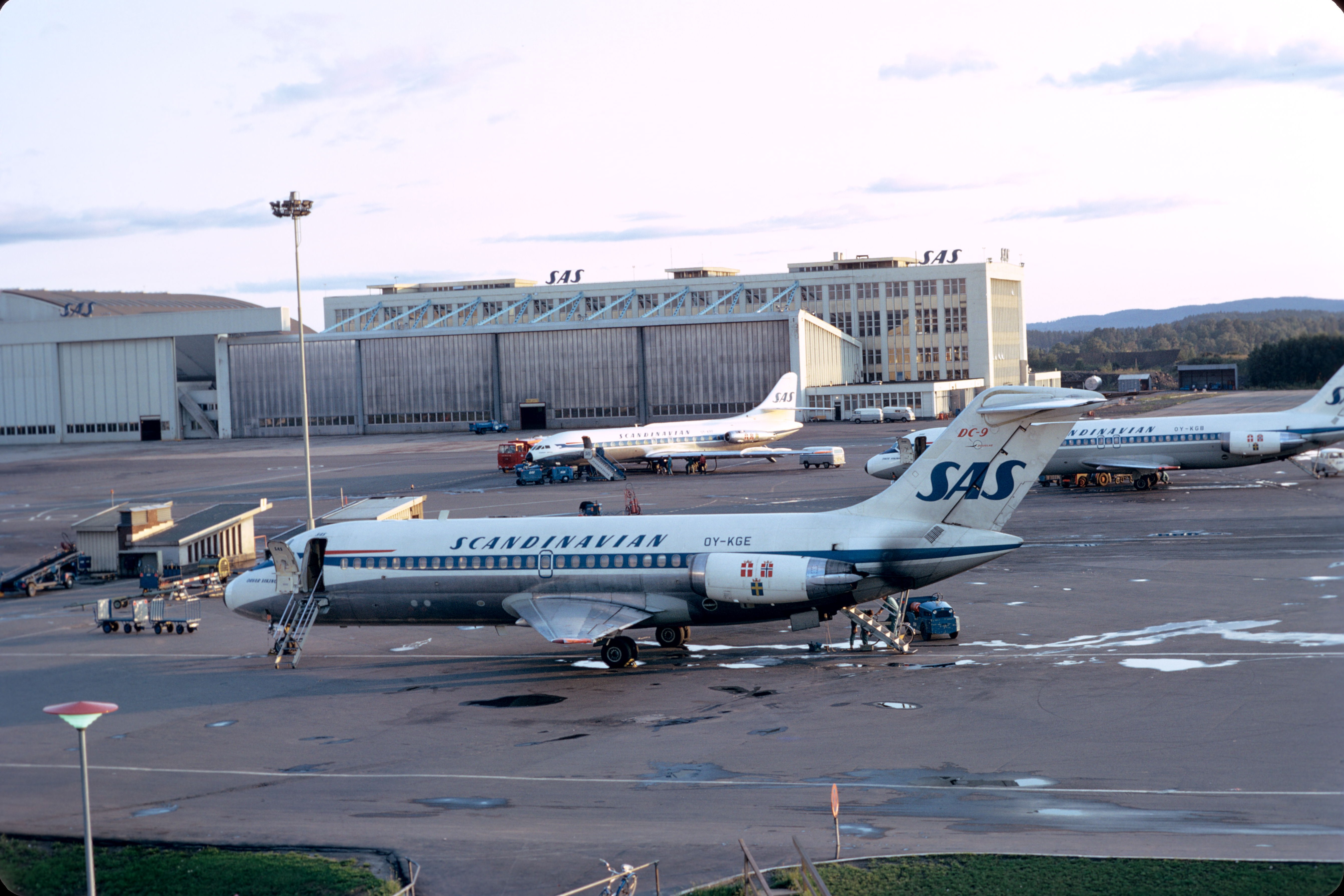 Un avion DC-9-21 des SAS Scandinavian Airlines (anciennement Scandinavian Airlines System) à l'aéroport d' Oslo Fornebu. Cet avion appelé "Orvar Viking" (OY-KGE 47305) a volé de 1968 à 1995. Fornebu a été fermé en 1998. Oslo, Norvège.